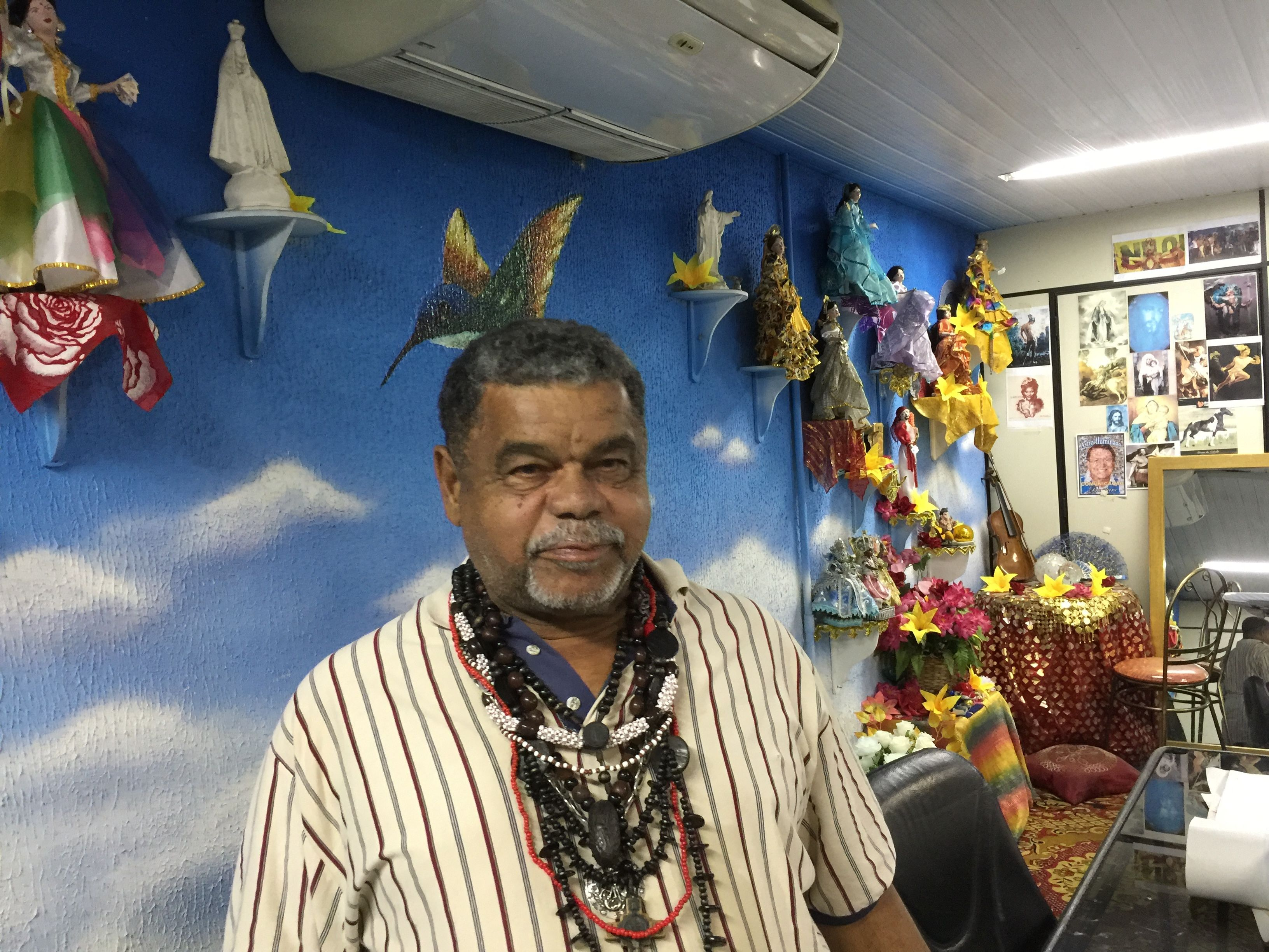 Rio de Janeiro - Laíla, diretor de Carnaval da Beija-Flor, contou que desastre em Mariana reduziu a possibilidade de apoio financeiro de mineradoras à escola (Cristina Indio do Brasil/Agência Brasil)